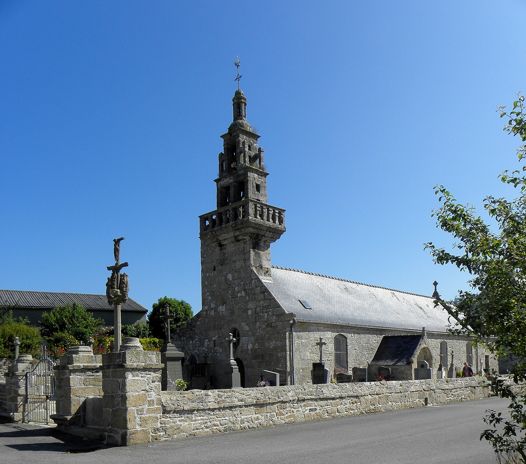 Église Saint-Brévalaire et son calvaire, commune de Loc-Brévalaire (29).